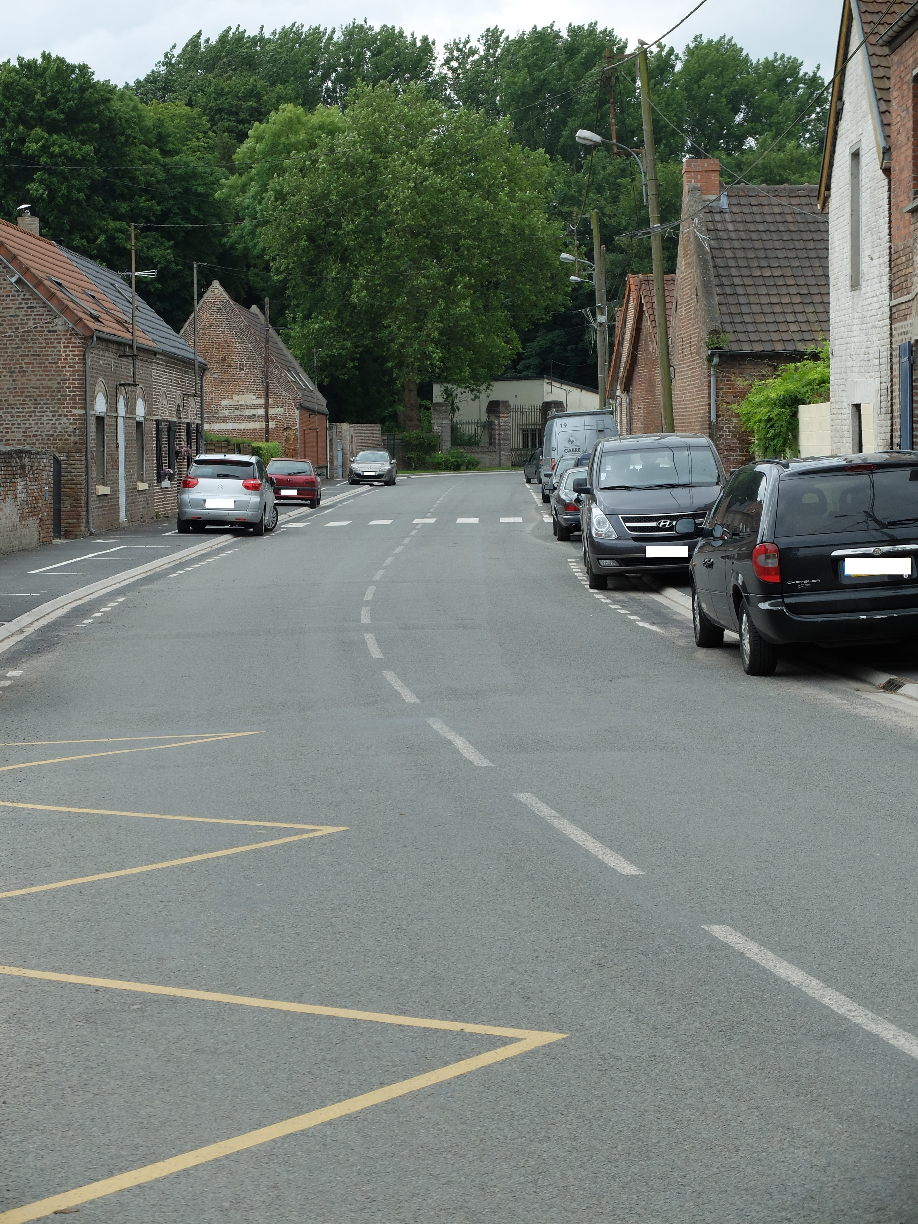 Vue de la grande rue de Récourt (Pas-de-Calais).